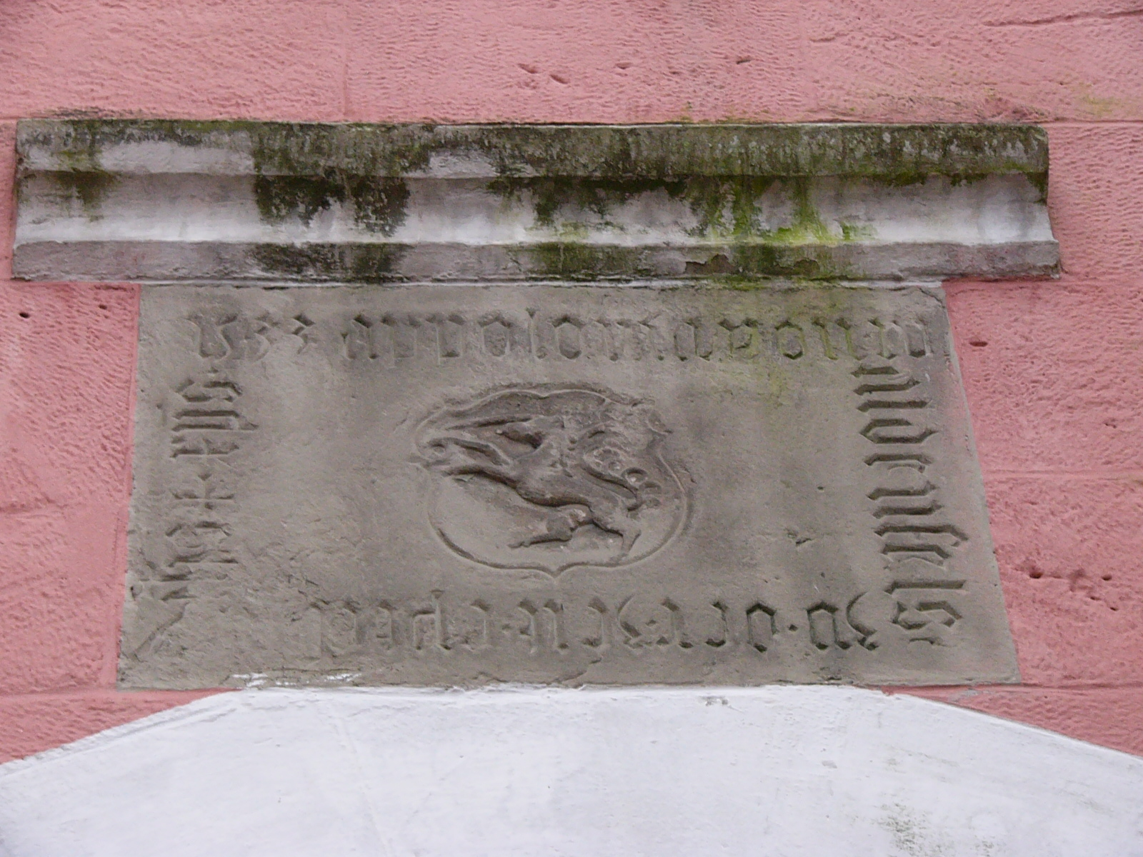 Wappen von Apollonia von Waldenfels († 21. Februar 1543) über einem Torbogen im Kloster Himmelkron.